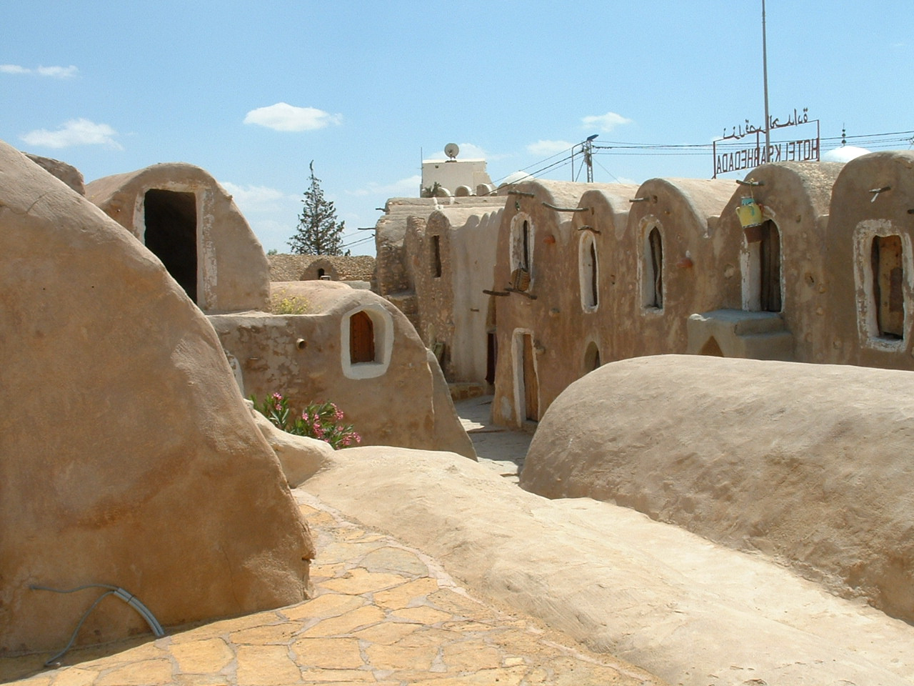 Ksar Hadada en Tunisie